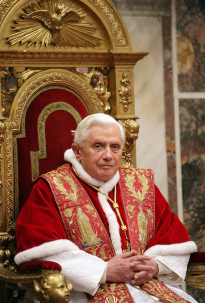 Chụp cận cảnh Đức Giáo Hoàng Benedict XVI trong một buổi tiếp kiến riêng tại Dinh Tông Tòa (Apostolic Palace), Vatican.